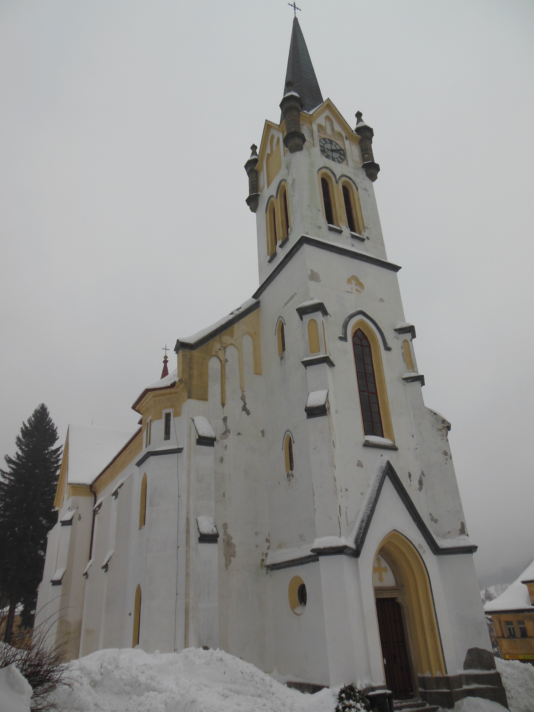 Pseudogotický kostel Proměnění Páně postavený v letech 1862-1865.